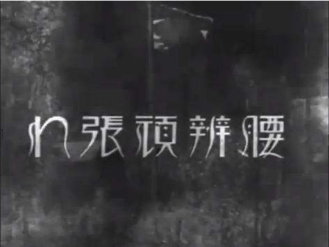 『腰辨頑張れ』、1931年、カットタイトル